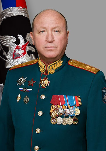 Ставицкий Юрий Михайлович - начальник инженерных войск Вооруженных Сил Российской Федерации, генерал-лейтенант